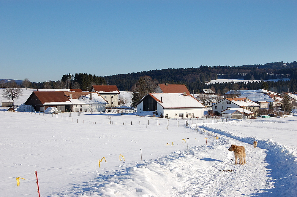 La Chaux-des-Breuleux